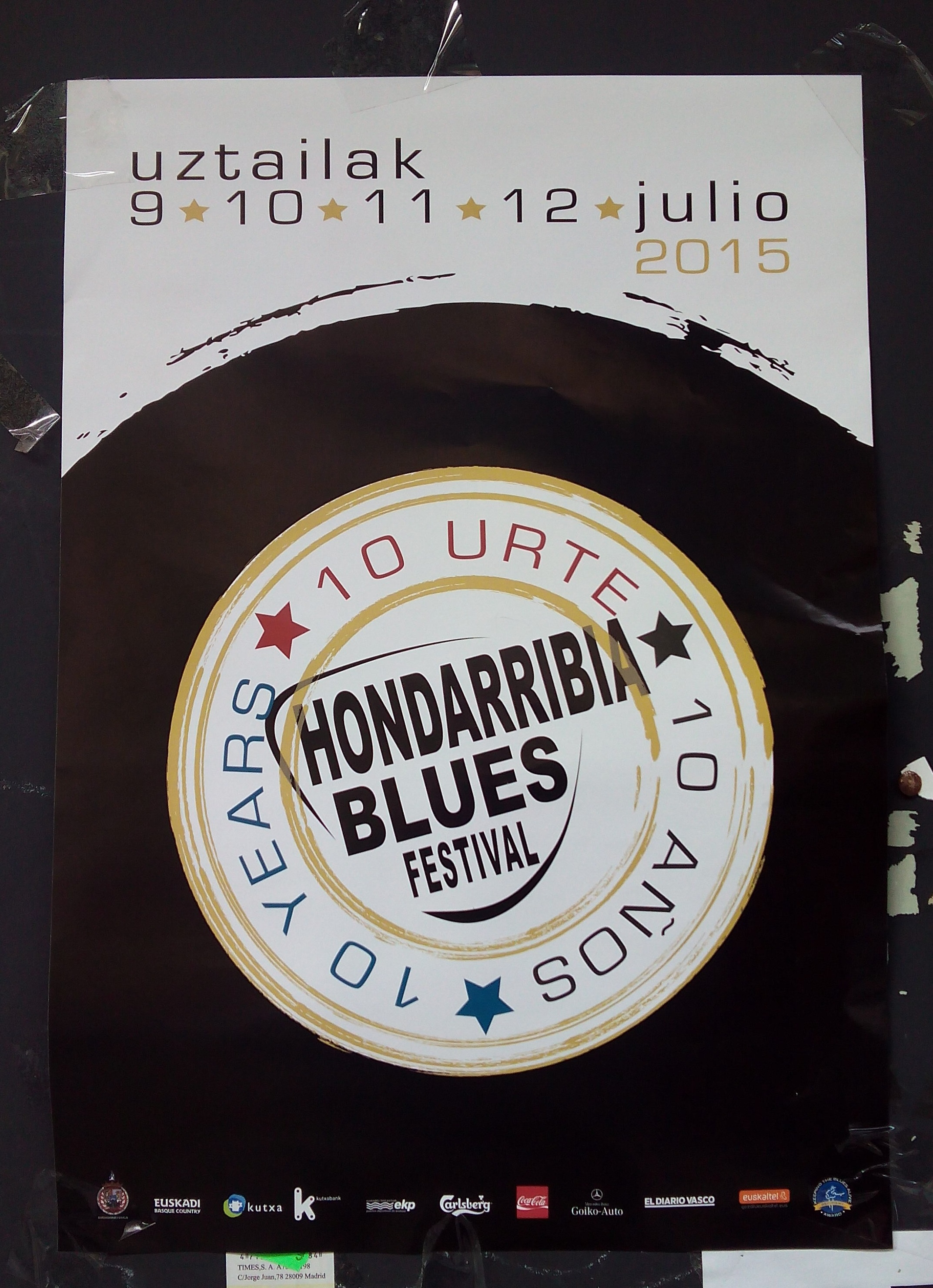 Banner announcing a blues festival in the Basque Country